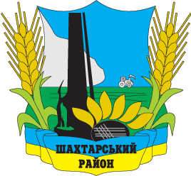 Герб Шахтарського району